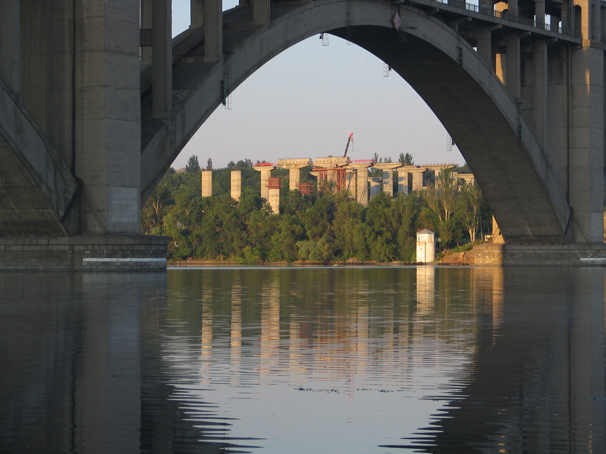 Строящиеся через Днепр мосты. Вид из-под пролёта существующего моста Преображенского.